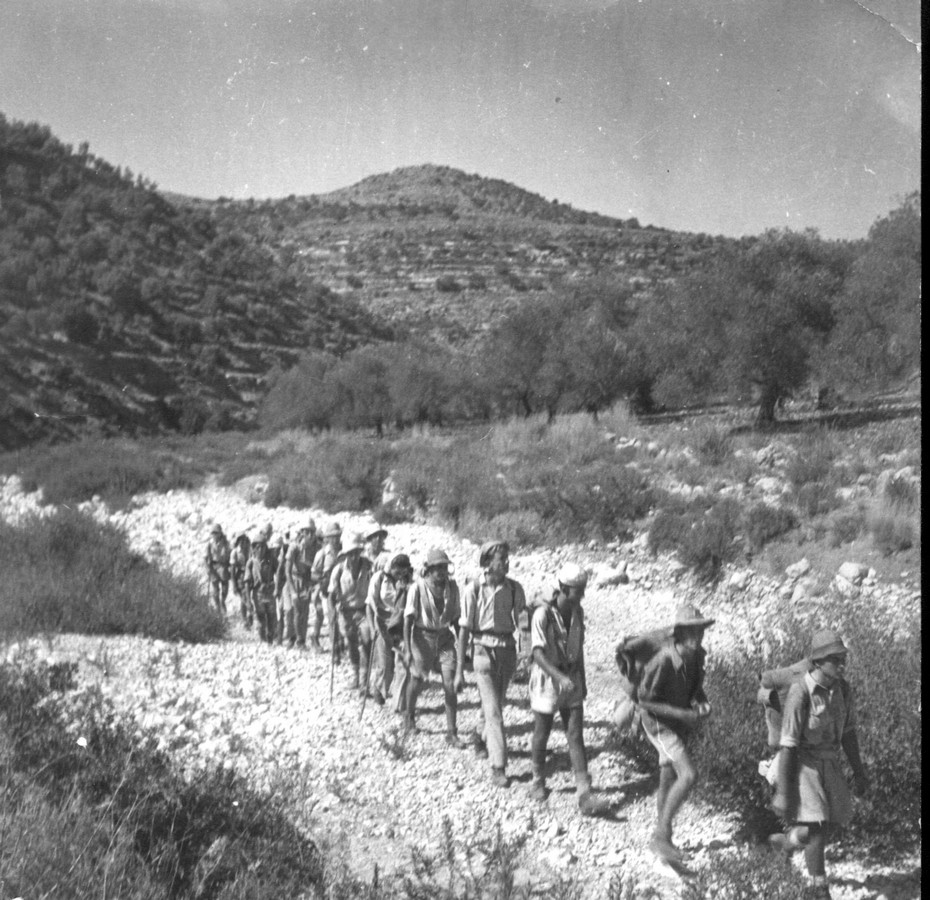 פלוגה ג סיורי הסיירים 2 - סיורי הסיירים - מחלקת הסיירים - השומרון הדרומי - ליד הכפרים סלפית, חרבת קייס, קרוואט ,בני זייד, כפר עין